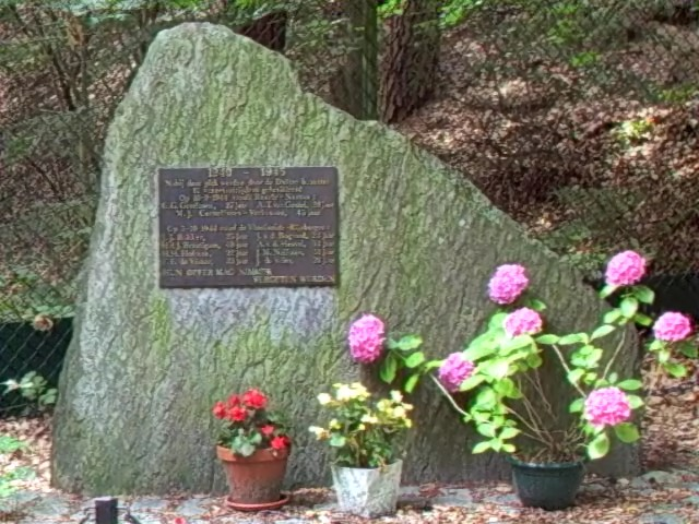 Zicht op een deel van het Oorlogsmonument Mastbos aan de Galderseweg, Breda. Niet ver van de wijk het Ginneken)